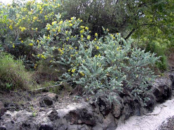 Acacia podalyriifolia